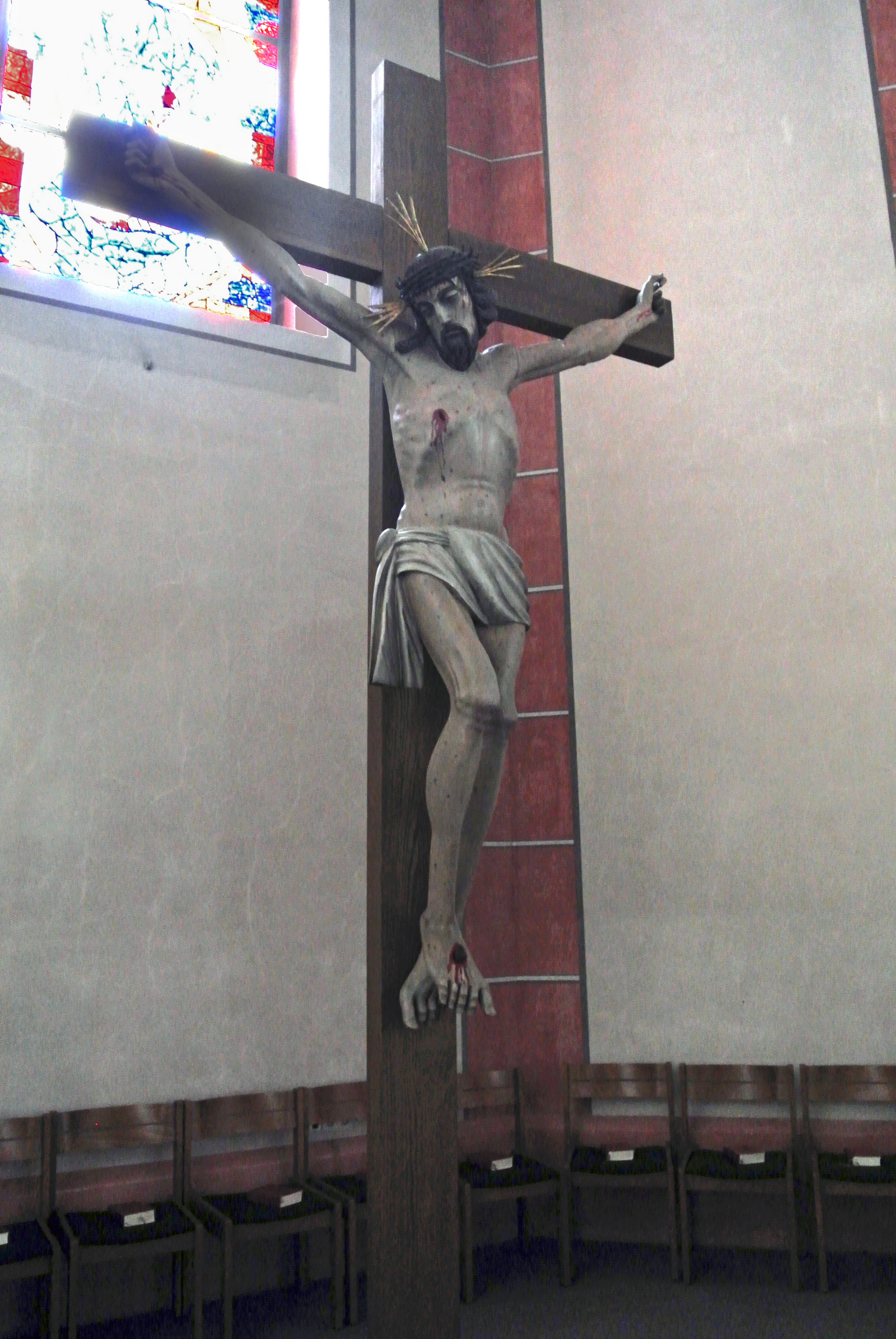 Kruzifix im Altarraum der Evangelischen Kirche Ihringen